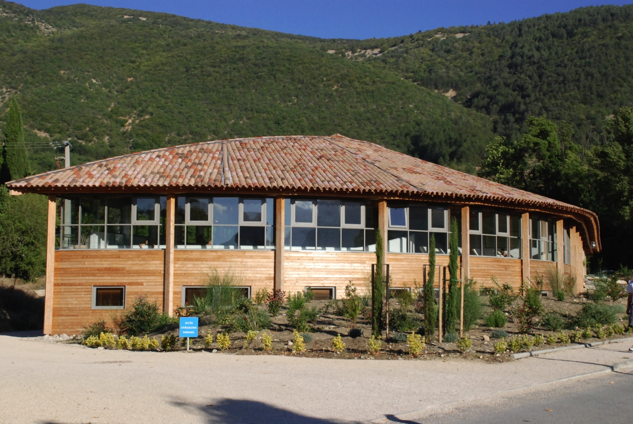 Montbrun-les-Bains-les thermes